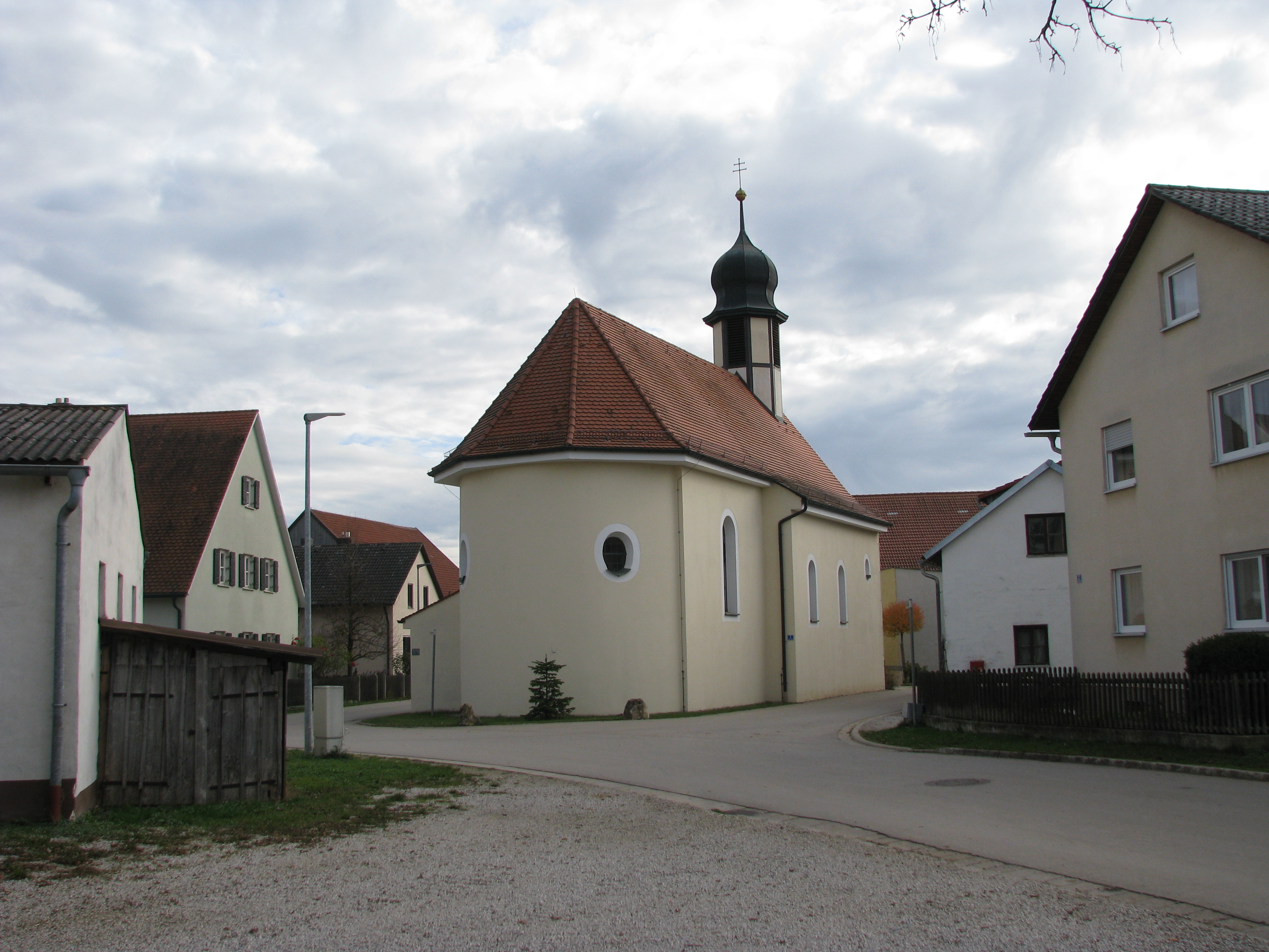 Kaising, Ortsteil der Stadt Greding im mittelfränkischen Landkreis Roth in Bayern, Dorfkirche "Unbefleckte Empfängnis Mariä"